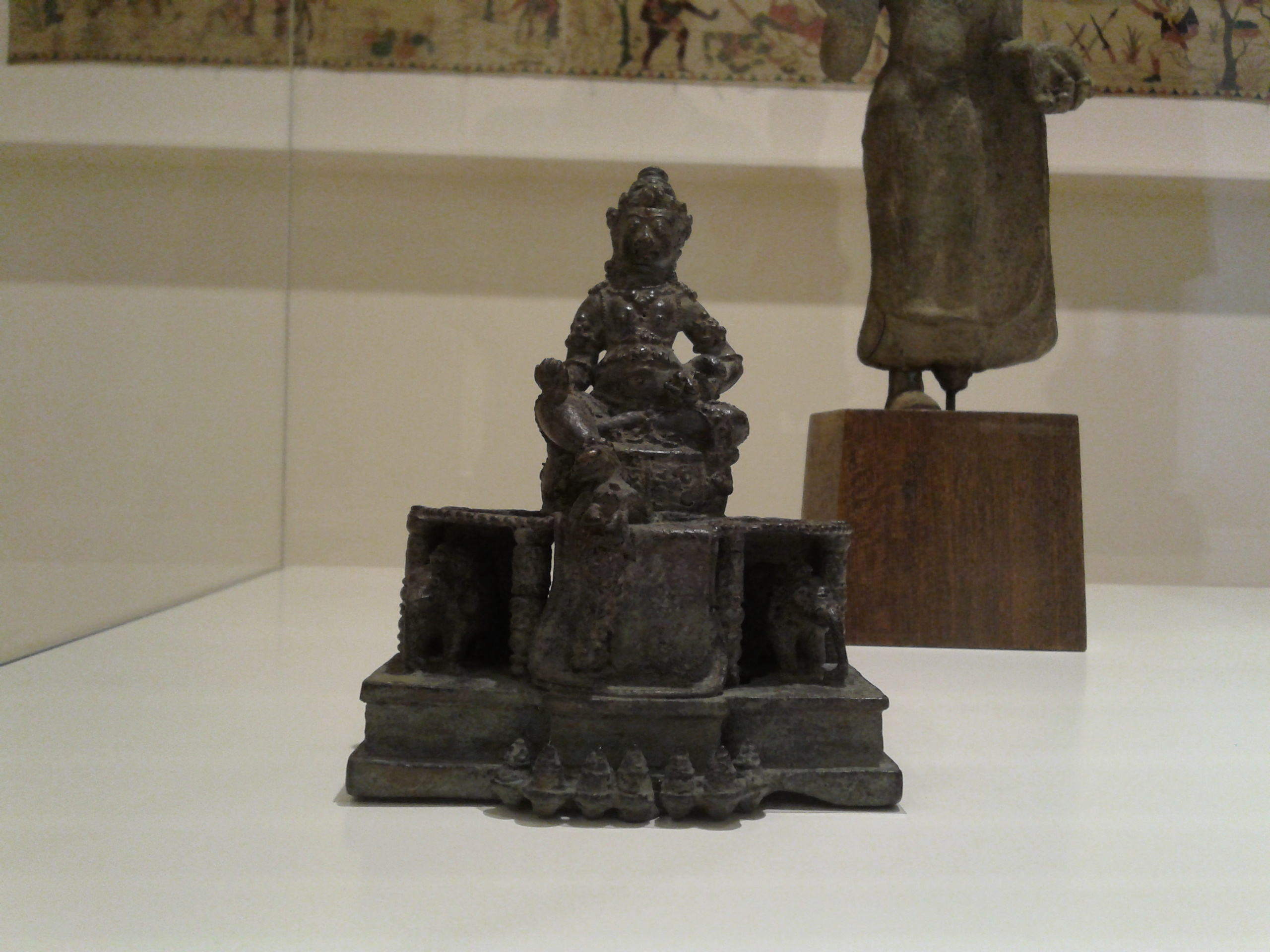 Kuber Hindu God of wealth - 14th Century carving National Gallery of Victoria